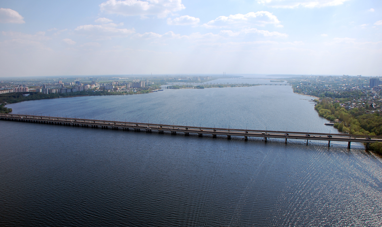 Северный мост в Воронеже